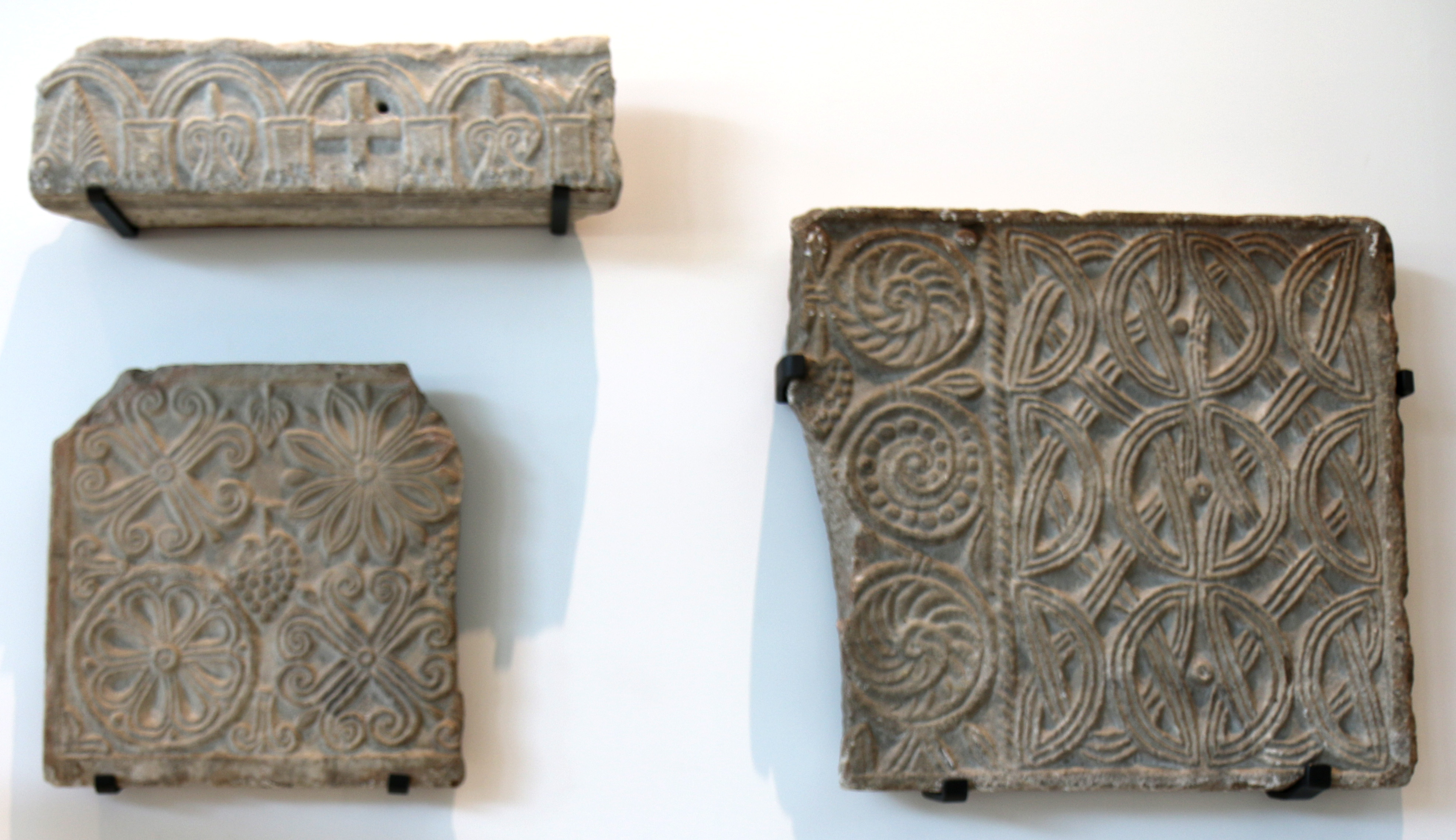 Fragments de linteaux et de chancels. VIII° - IX° siècle